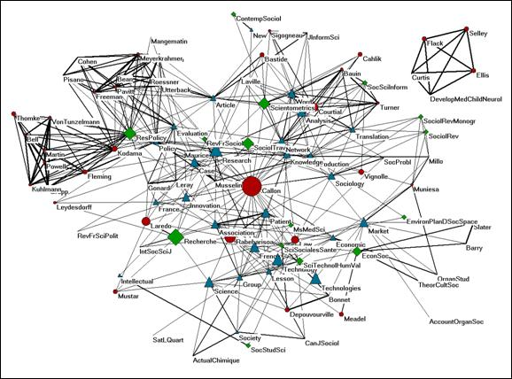 Imatge il·lustrativa teoria de l'actor-xarxa